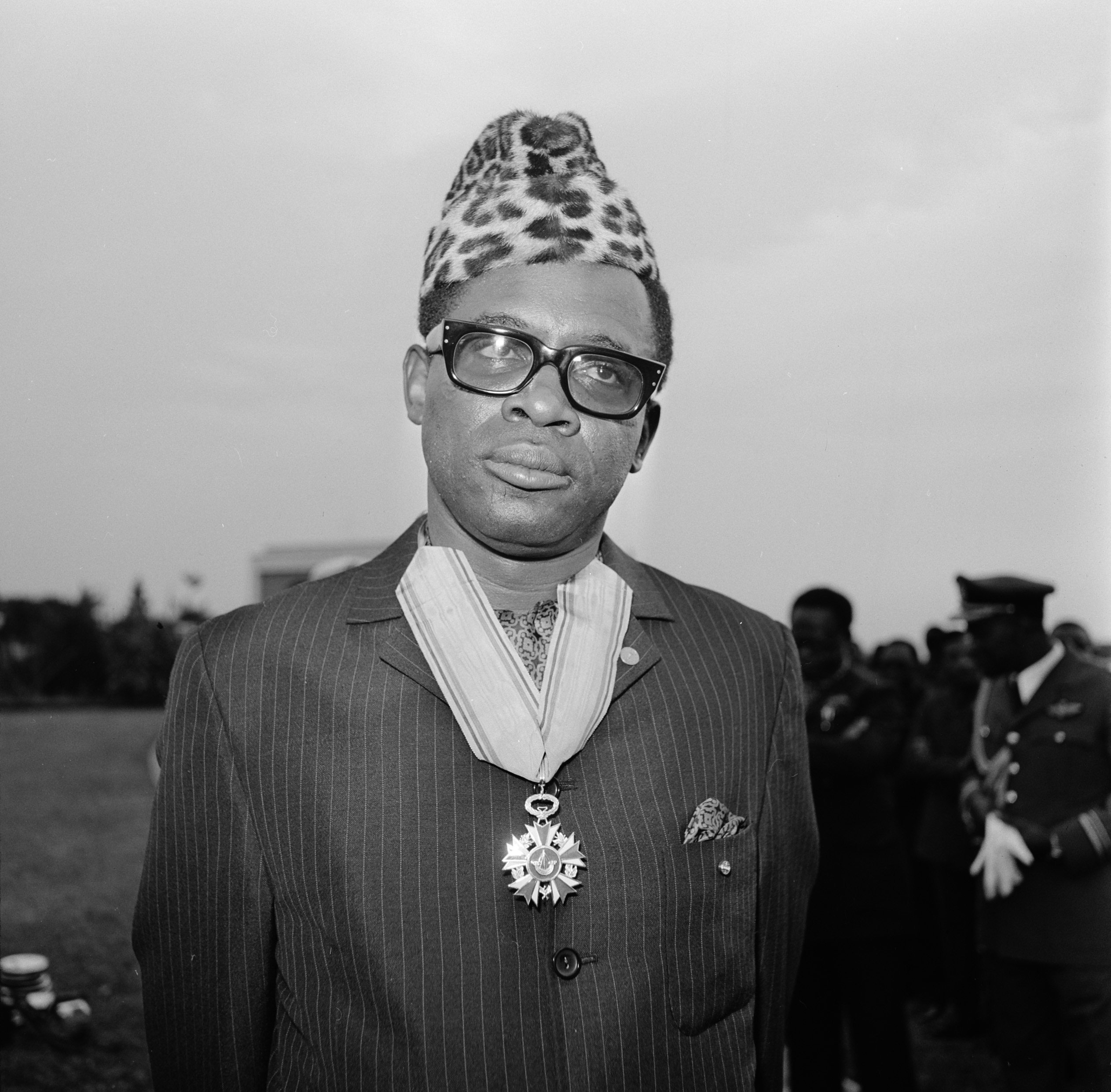 Collectie / Archief : Fotocollectie Anefo Reportage / Serie : [ onbekend ] Beschrijving : Prins Bernhard in Zaire (voorheen Belgisch Congo), Bernhard en Mobutu Datum : 12 augustus 1973 Locatie : Zaïre Trefwoorden : presidenten, prinsen Persoonsnaam : Bernhard, prins Fotograaf : Mieremet, Rob / Anefo Auteursrechthebbende : Nationaal Archief Materiaalsoort : Negatief (zwart/wit) Nummer archiefinventaris : bekijk toegang 2.24.01.03 Bestanddeelnummer : 926-6037